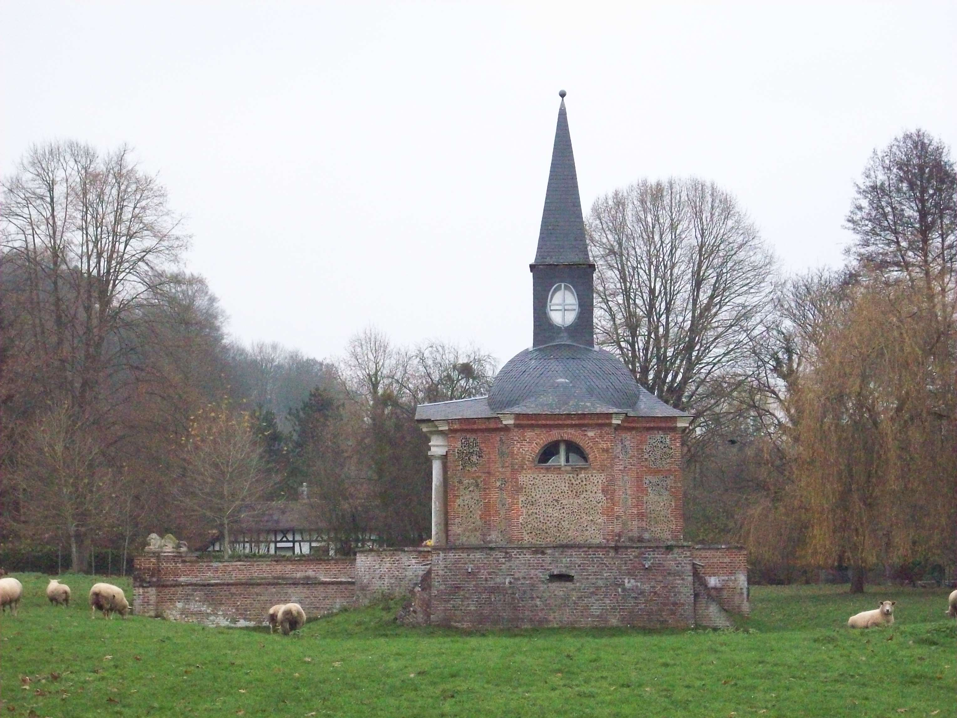 Chapelle funéraire Saint-Laurian, à Saint-Denis-le-Thiboult.